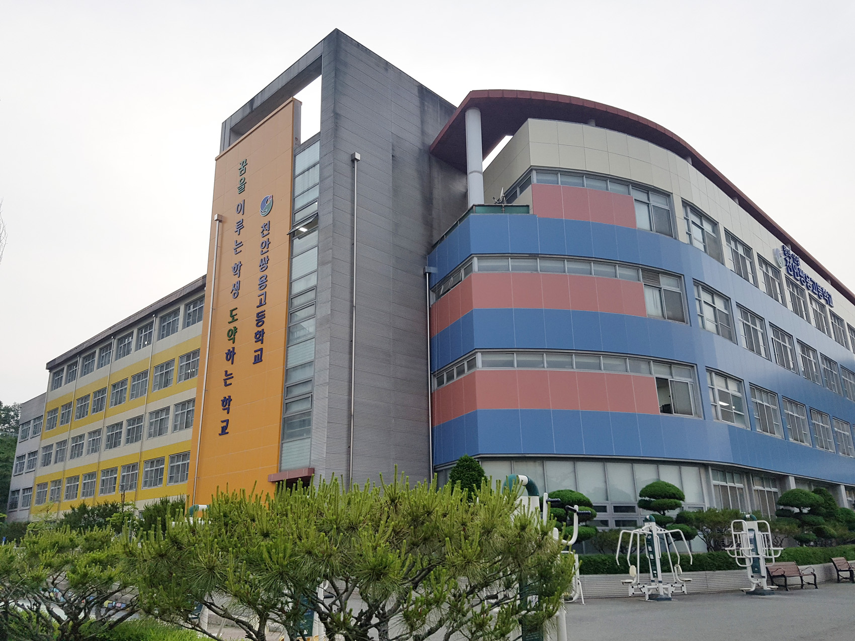 천안 쌍용고등학교